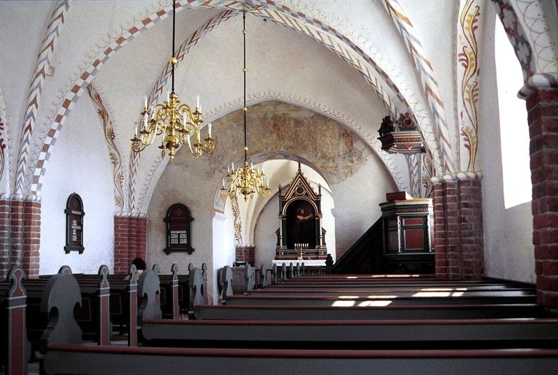 Ørridslev Kirke, kirkerummet set mod øst